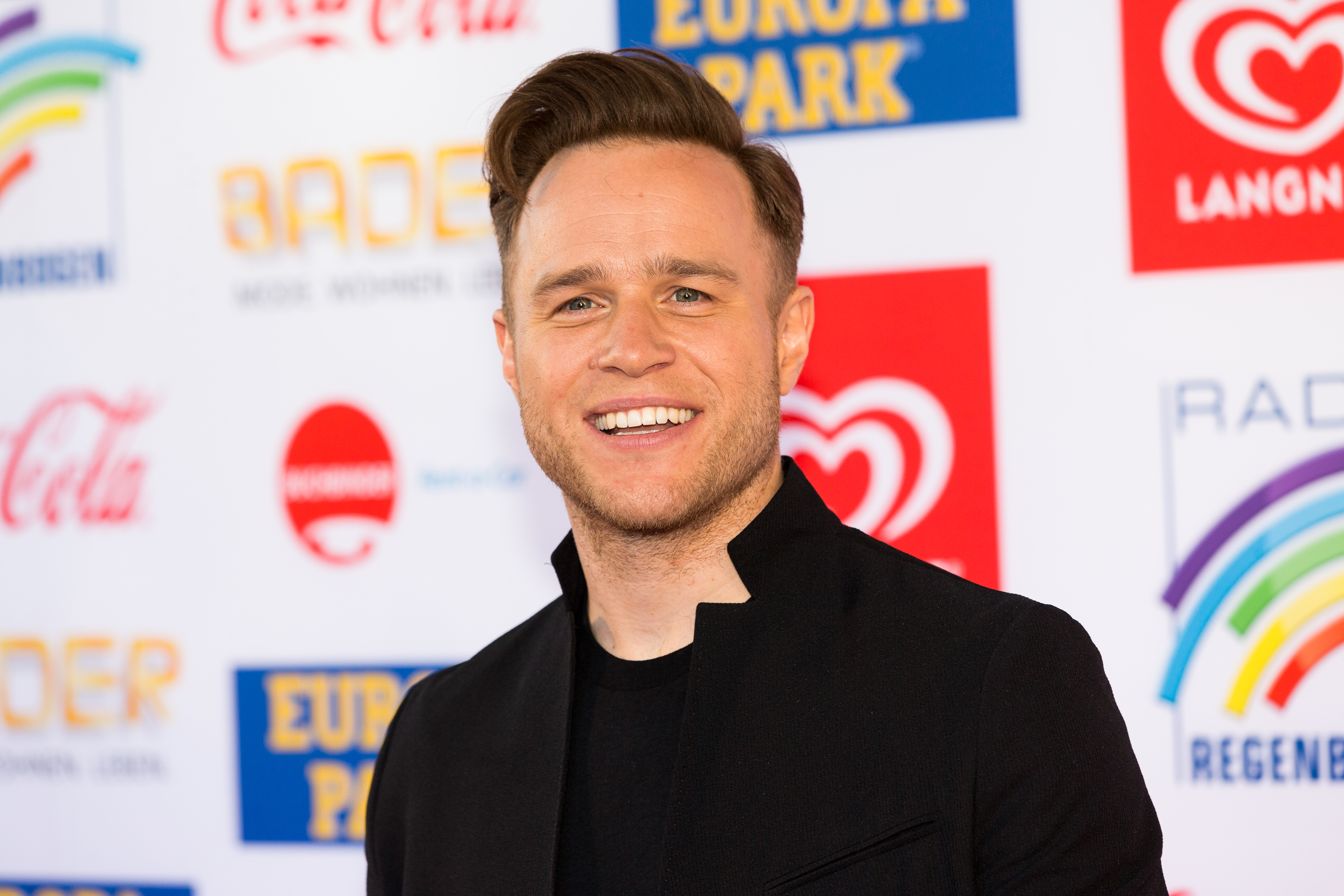 during Radio Regenbogen Award 2017 at Europapark, Rust, Baden-Württemberg, Germany on 2017-04-07, Photo: Sven Mandel